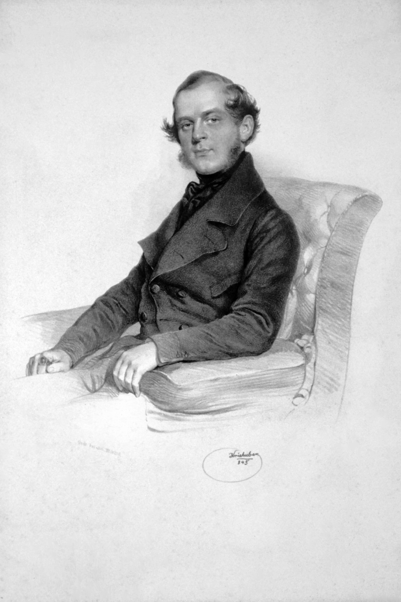 Johann Anton Graf von Goëss (1816-1887), Offizier, Großgrundbesitzer und Politiker. Er war 1861 bis 1876 Landeshauptmann von Kärnten.